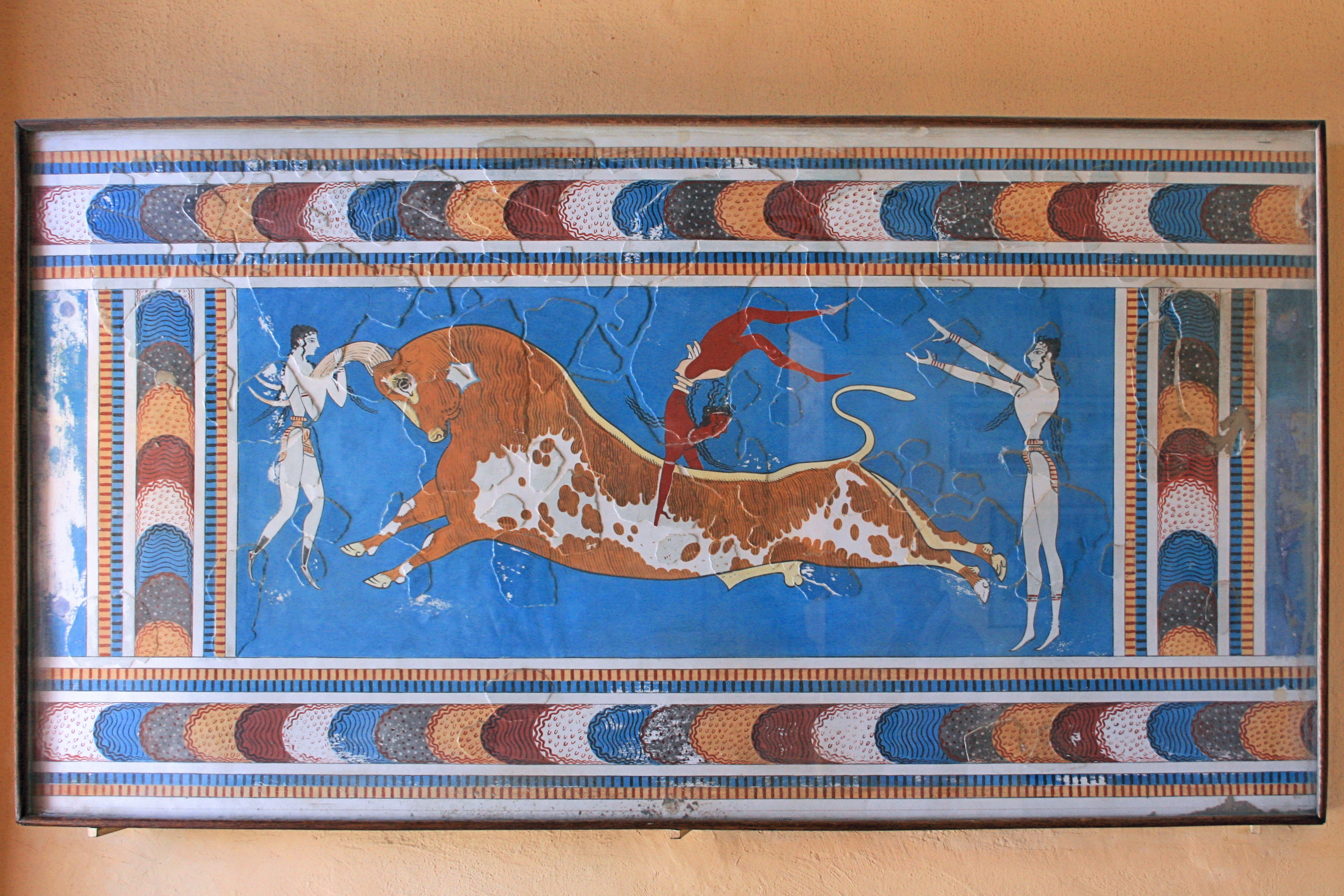 Das Stierspiel-Fresko im minoischen Palast von Knossos auf der griechischen Insel Kreta (Das Original befindet sich im Archäologischen Museum Iraklio)